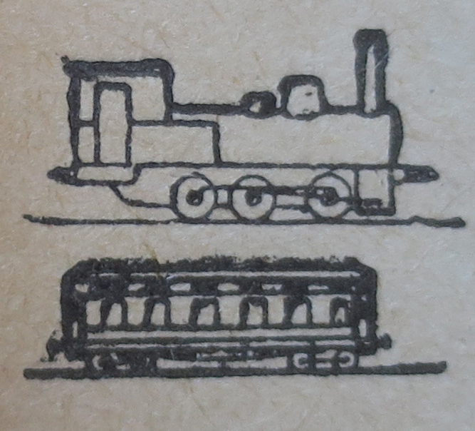 Symbole im Amtsblatt der Eisenbahndirektion Mainz für Bekanntmachungen an das Fahrpersonal